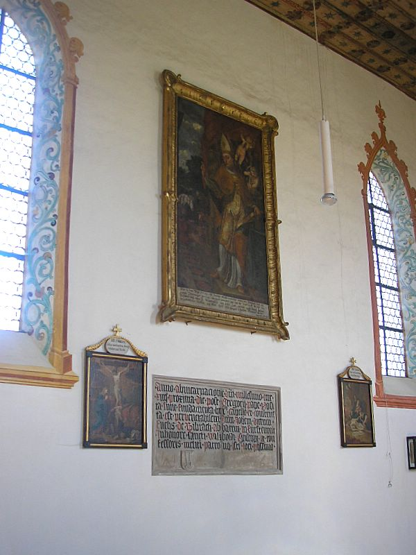 Wallfahrtskirche St. Willibald (Jesenwang, Landkreis Fürstenfeldbruck, Oberbayern). Die Nordwand des Langhauses. Eigene Aufnahme, Okt. 2006 / Pilgrimage church St. Willibald at Jesenwang (Upper Bavaria, Germany). North side of the nave. Own photo, Oct. 2006